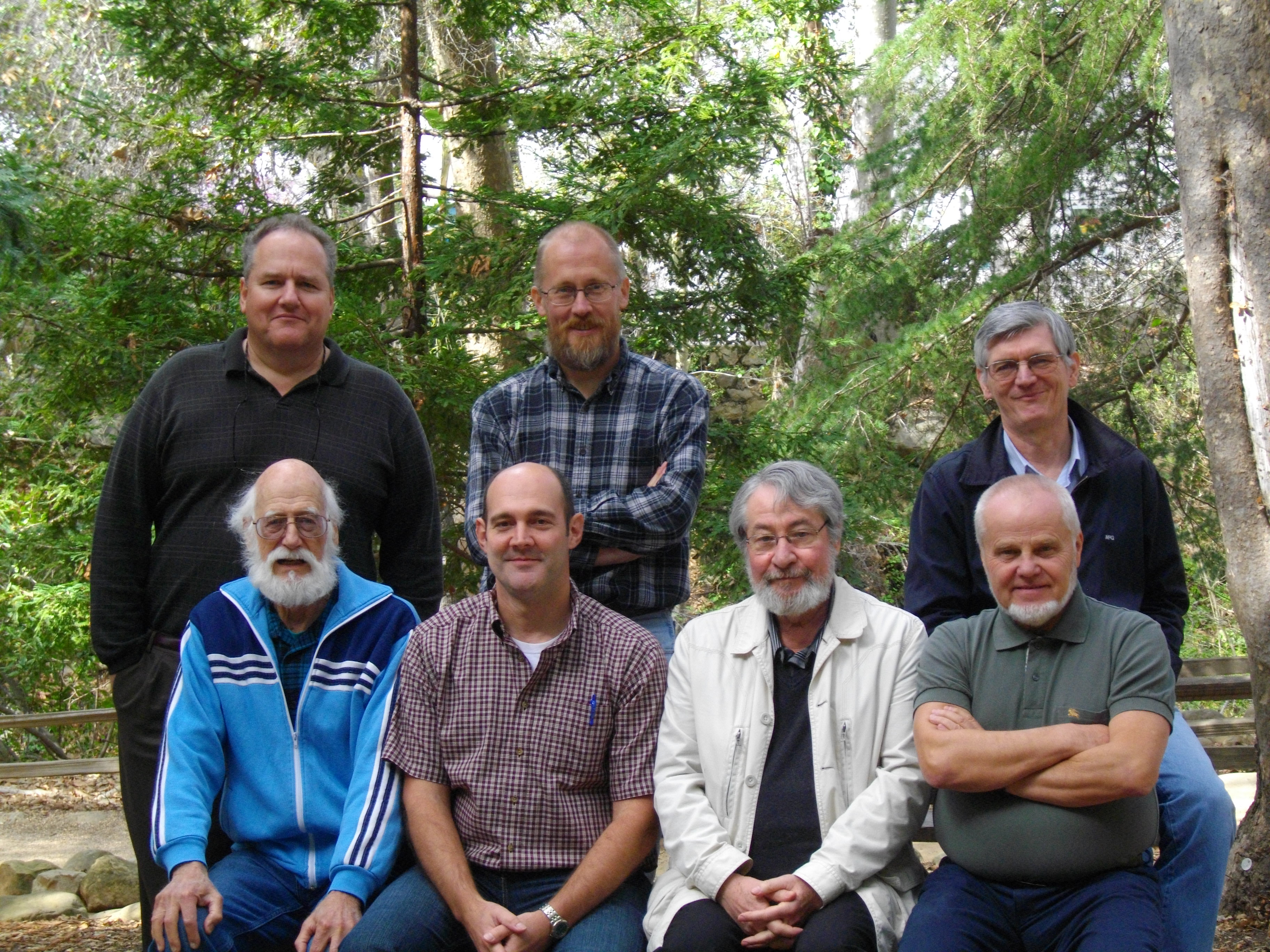 Premier plan (de gauche à droite): David S. Verity, Michael S. Caterino, Yves Gomy, Slawomir Mazur. Second plan (de gauche à droite): William B. Warner, Alexey K. Tishechkin et Nicolas Degallier